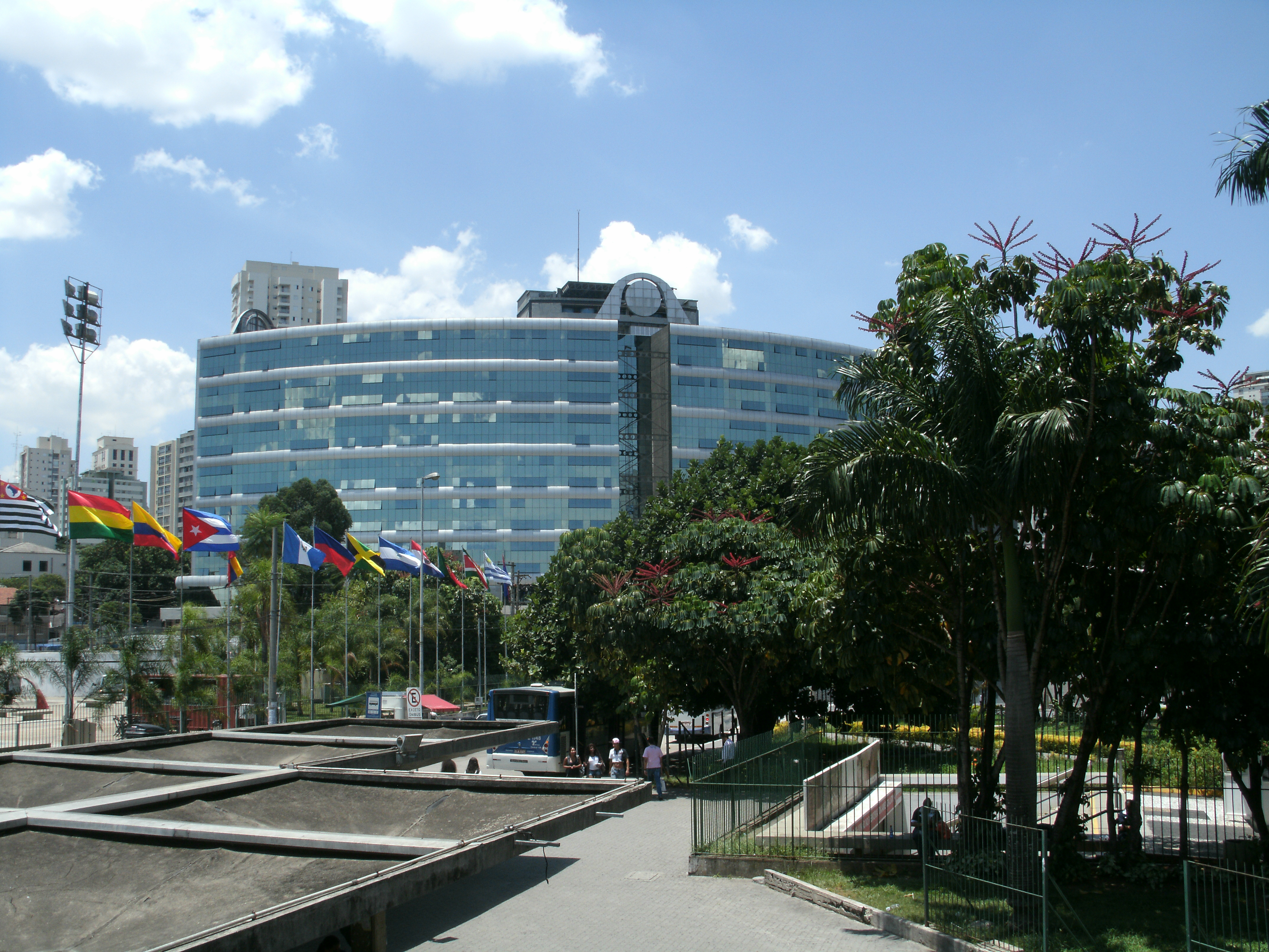 UNINOVE - Campus Memorial - Avenida Doutor Adolpho Pinto, 109